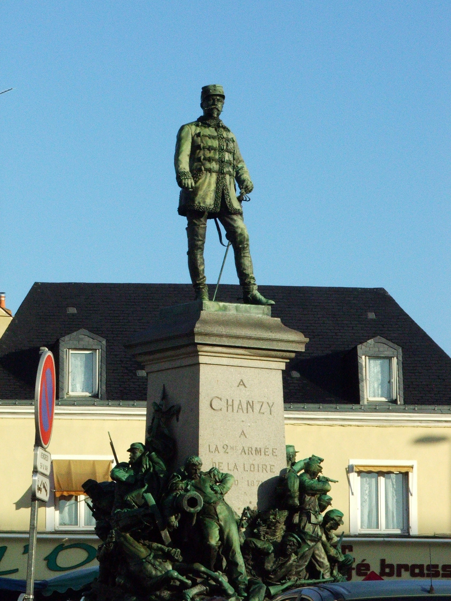 La statue de Chanzy place Washington au Mans.